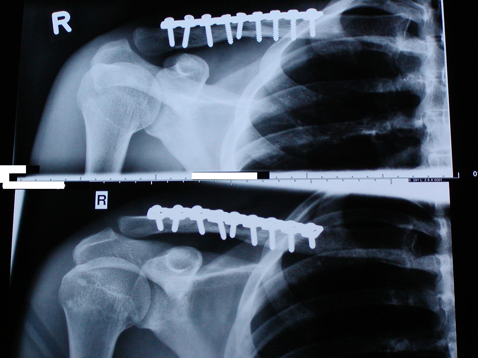 Geschraubter Schlüsselbeinbruch